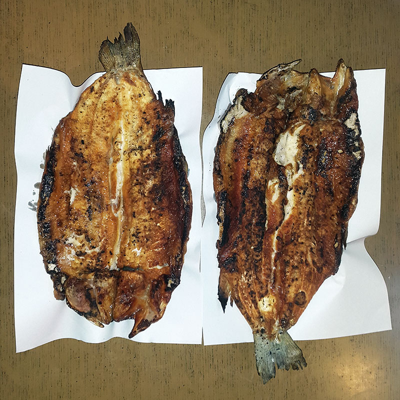 ماهی ساجی غذای سنتی شهر میانه در آذربایجان شرقی است